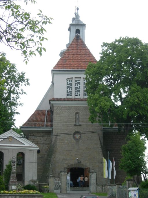 Kościół parafialny w Górze Ropczyckiej pod wezwaniem Św. Jakuba